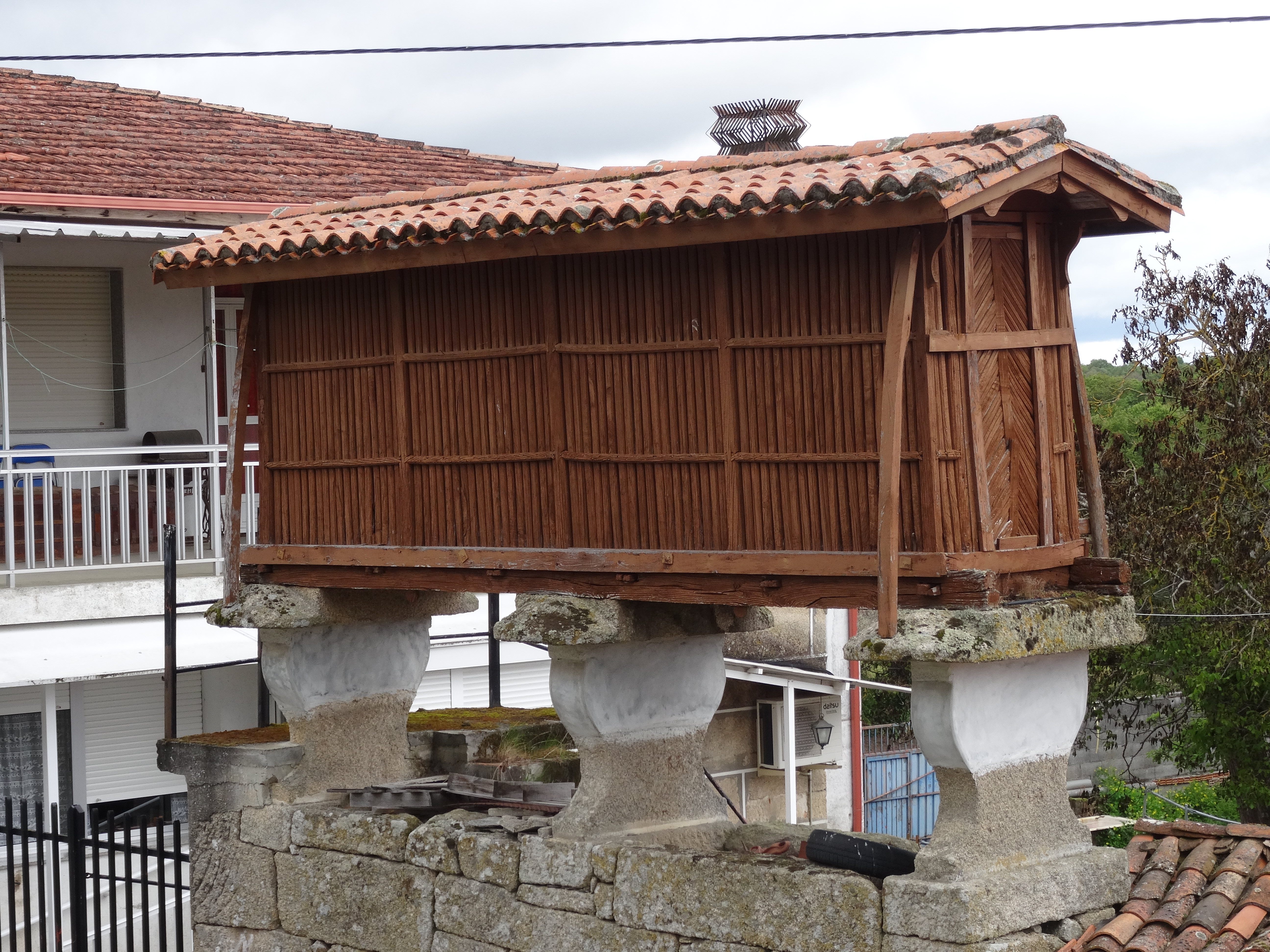 Ver título.